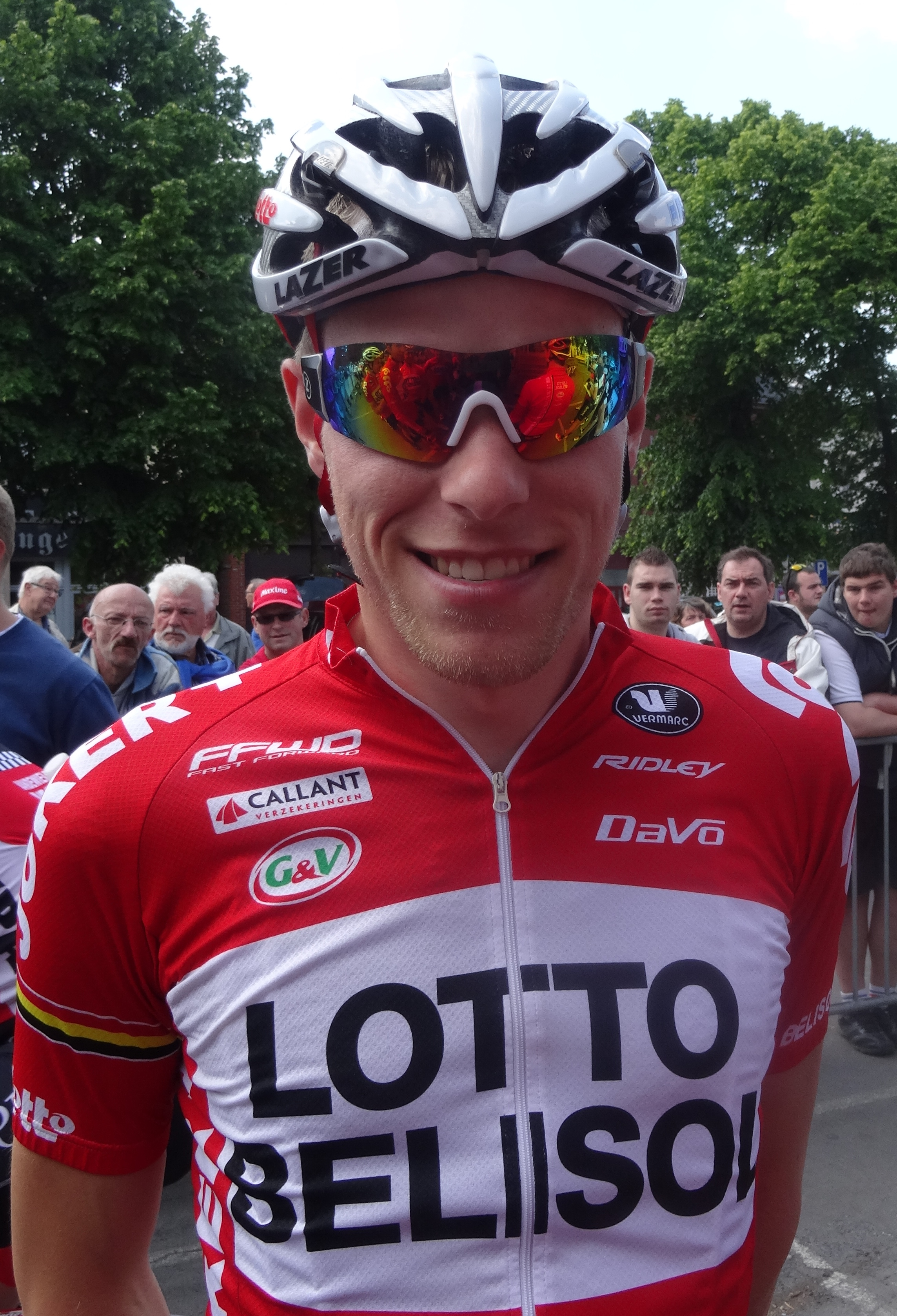 Reportage réalisé le samedi 17 mai à l'occasion du départ du Grand Prix Criquielion 2014 à Boussu, Belgique.